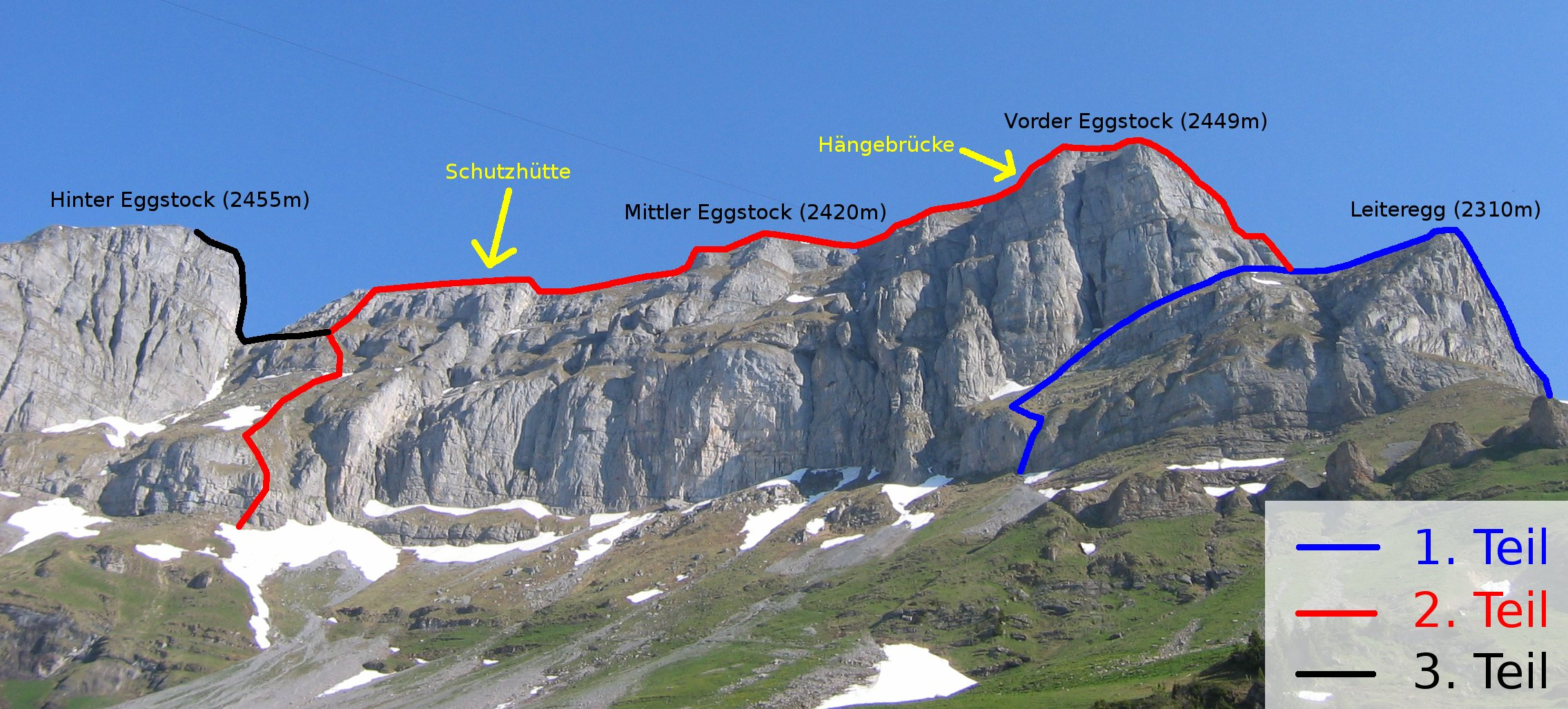 A scheme of the Klettersteig in Braunwald (Kanton Glarus, Switzerland)